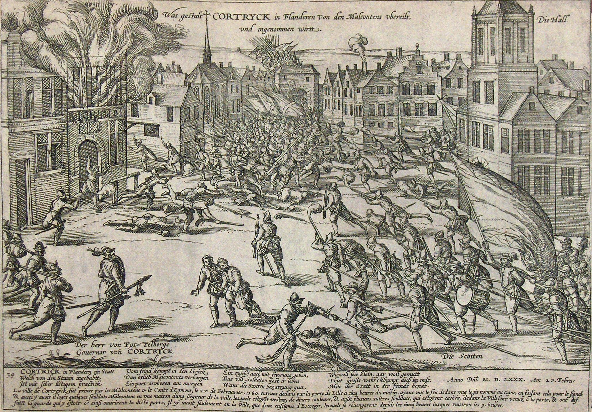 Inname van Kortrijk door de malcontenten en de graaf van Egmont op 27 februari 1580; gravure (1580) door een onbekende kunstenaar.